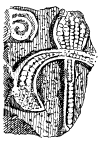 Декоративний елемент Василівської церкви-ротонди.